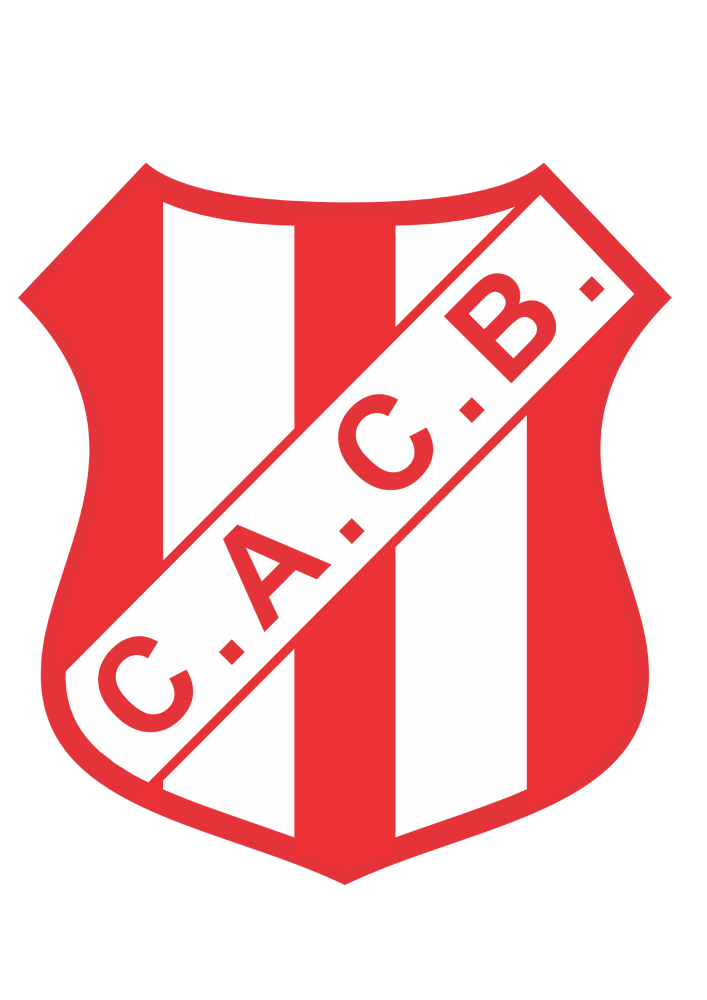 Escudo Original Municipalidad de El Carril